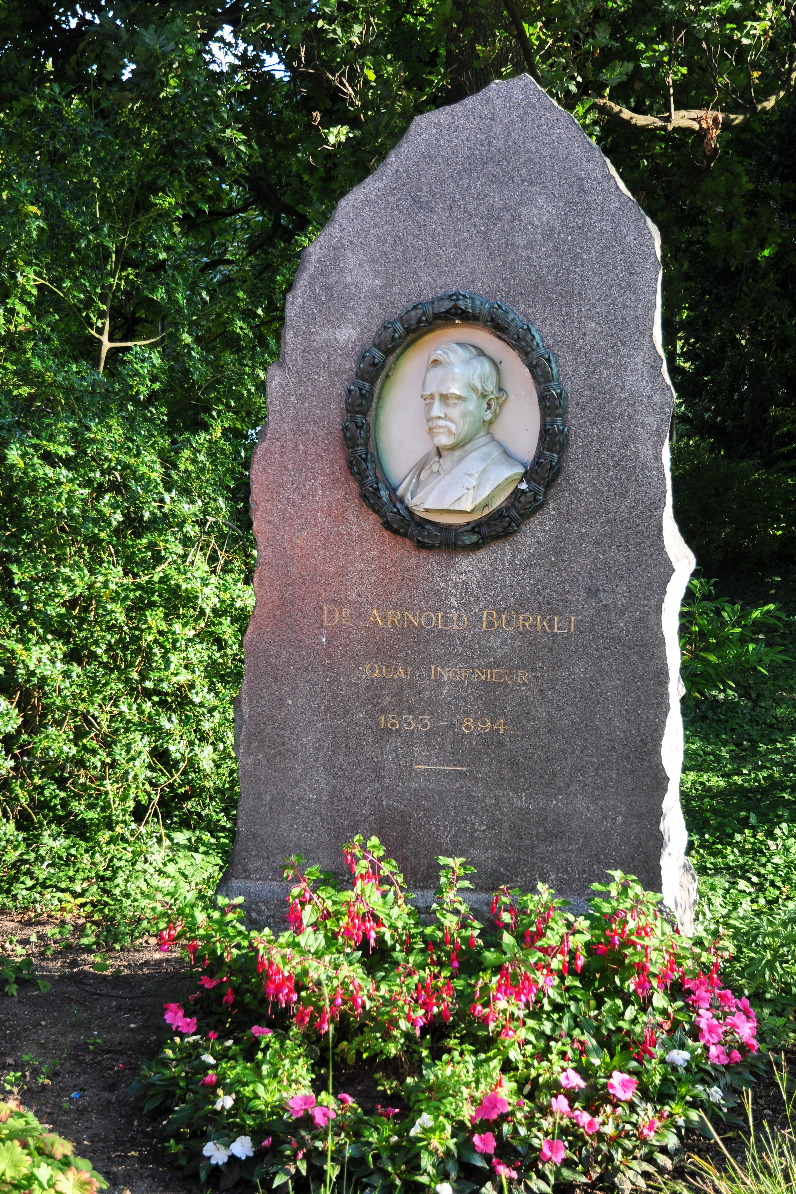 Arnold Bürkli memorial at Arboretum in Zürich-Enge (Switzerland)